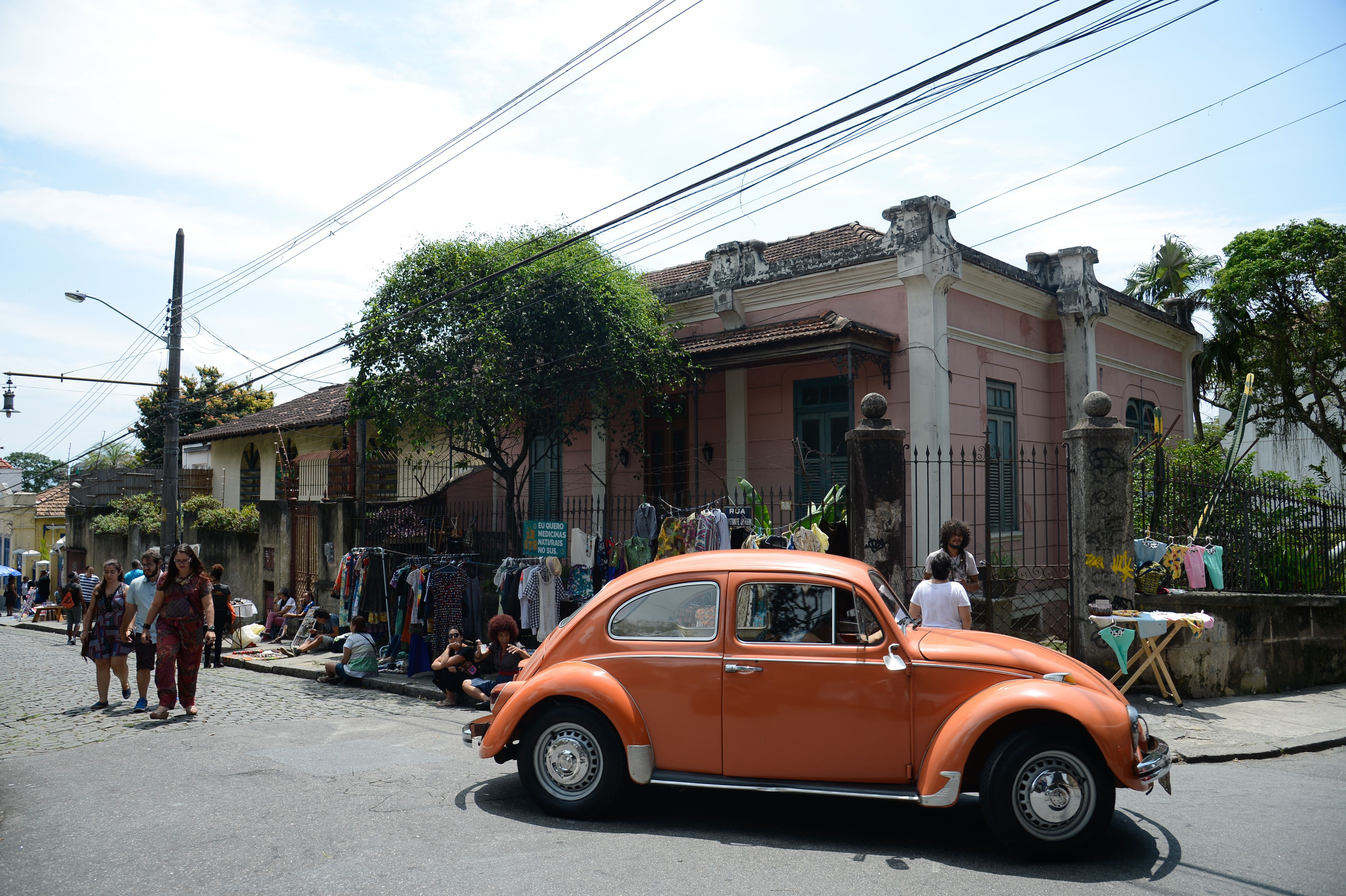 Rio de Janeiro - Visitantes no Arte de Portas Abertas no bairro de Santa Teresa.